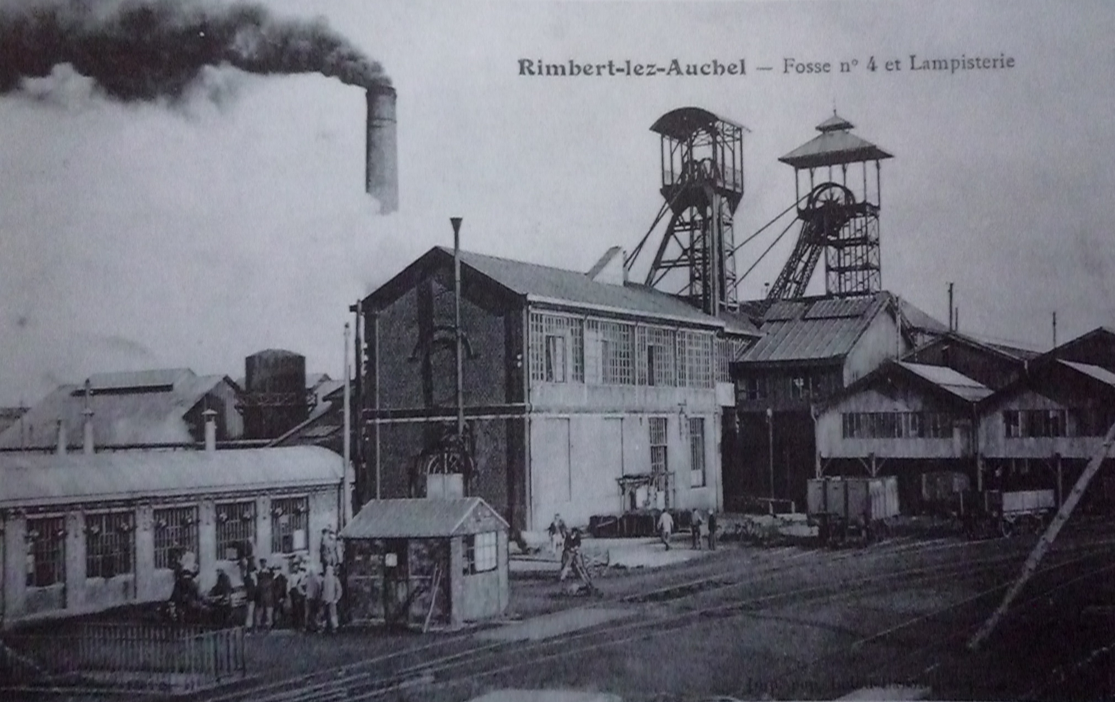 La Fosse n° 4 - 4 bis de la Compagnie des mines de Marles était un charbonnage constitué de deux puits situé à Auchel, Pas-de-Calais, Nord-Pas-de-Calais, France.